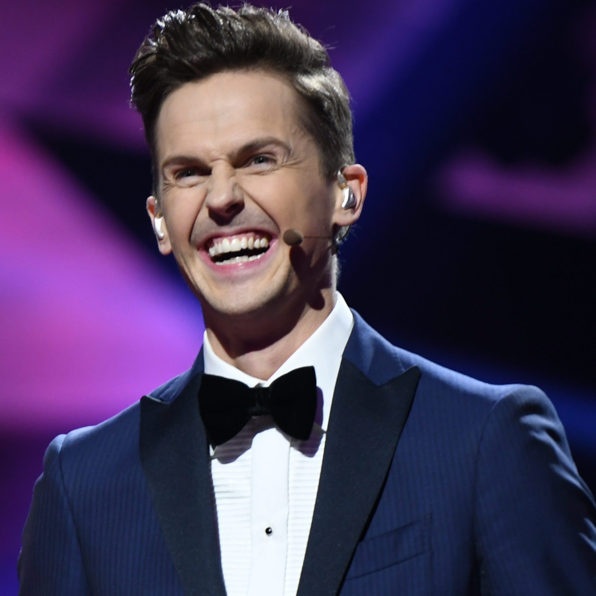 Andra chansen repetitionerna på fredagen.